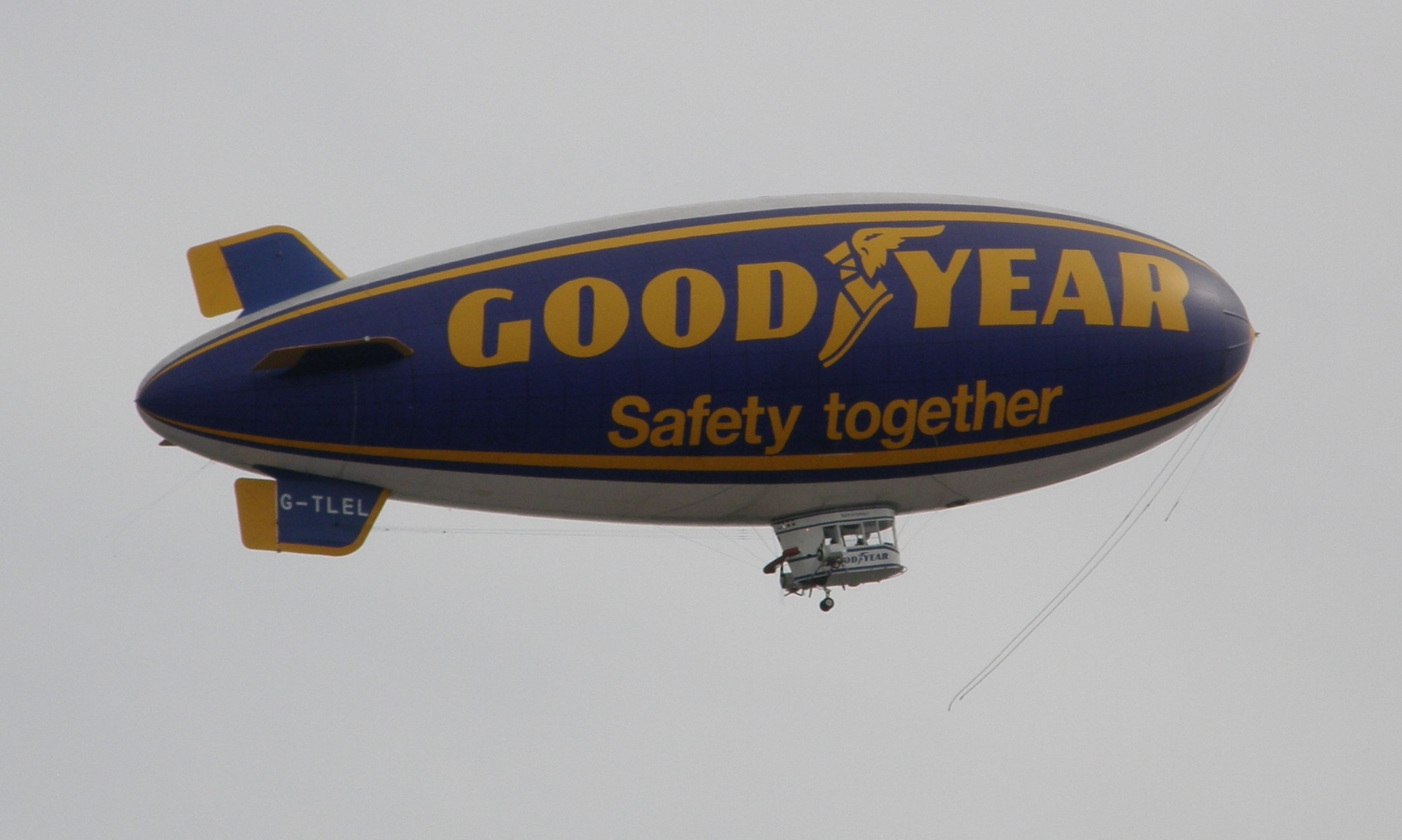 Prallluftschiff Spirit of Safety über dem Hessentag 2011 in Oberursel. Das Luftschiff verbrannte später am Tag der Aufnahme beim Landeanflug in Reichelsheim, wobei der Pilot getötet wurde.